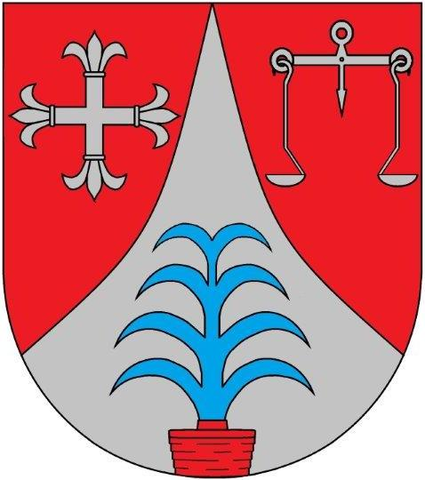 Blasonierung: Rot durch aufsteigende eingebogene silberne Spitze, darin blaue Fontäne aus rotem Brunnenbecken mit je vier seitlichen Kaskaden, gespalten, rechts silbernes Glevenkreuz, links silberne Balkenwaage.